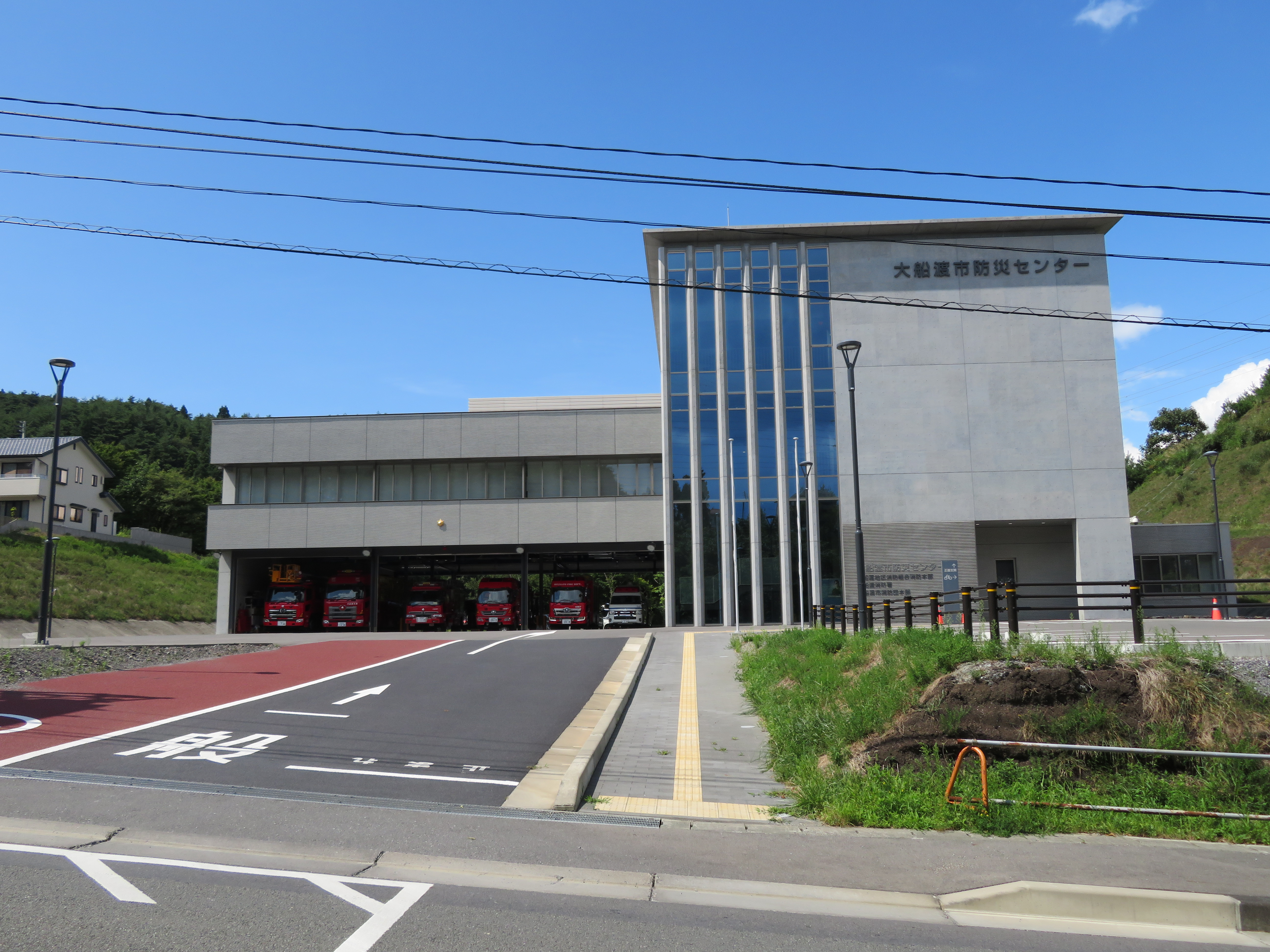 大船渡市防災センター・大船渡地区消防組合消防本部・大船渡消防署庁舎 Canon PowerShot SX720 HS